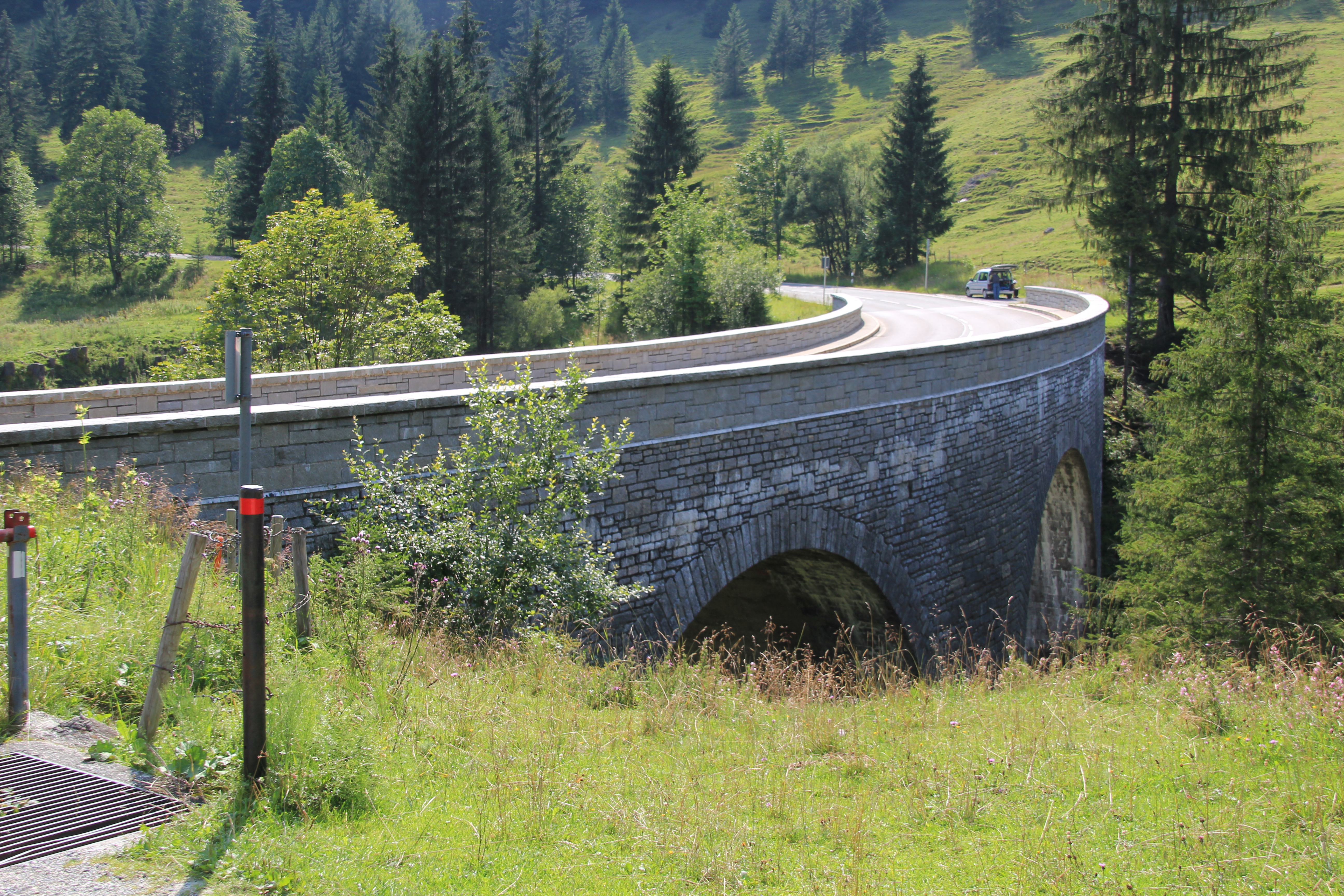 Arzbach-Brücke Armoos Sudelfeld